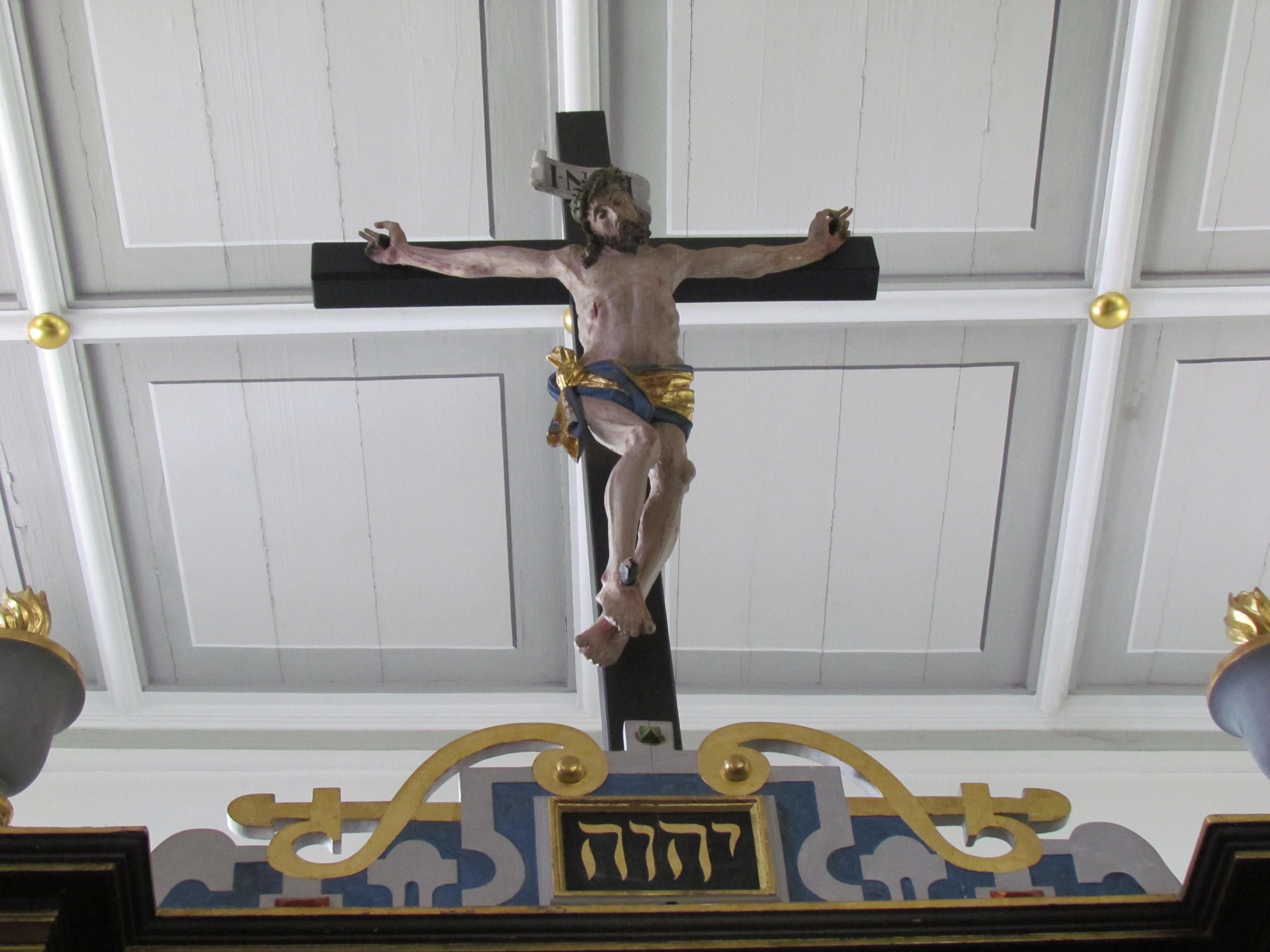 Großes barockes Holzkruzifix aus dem Jahr 1691, über dem Altar plaziert